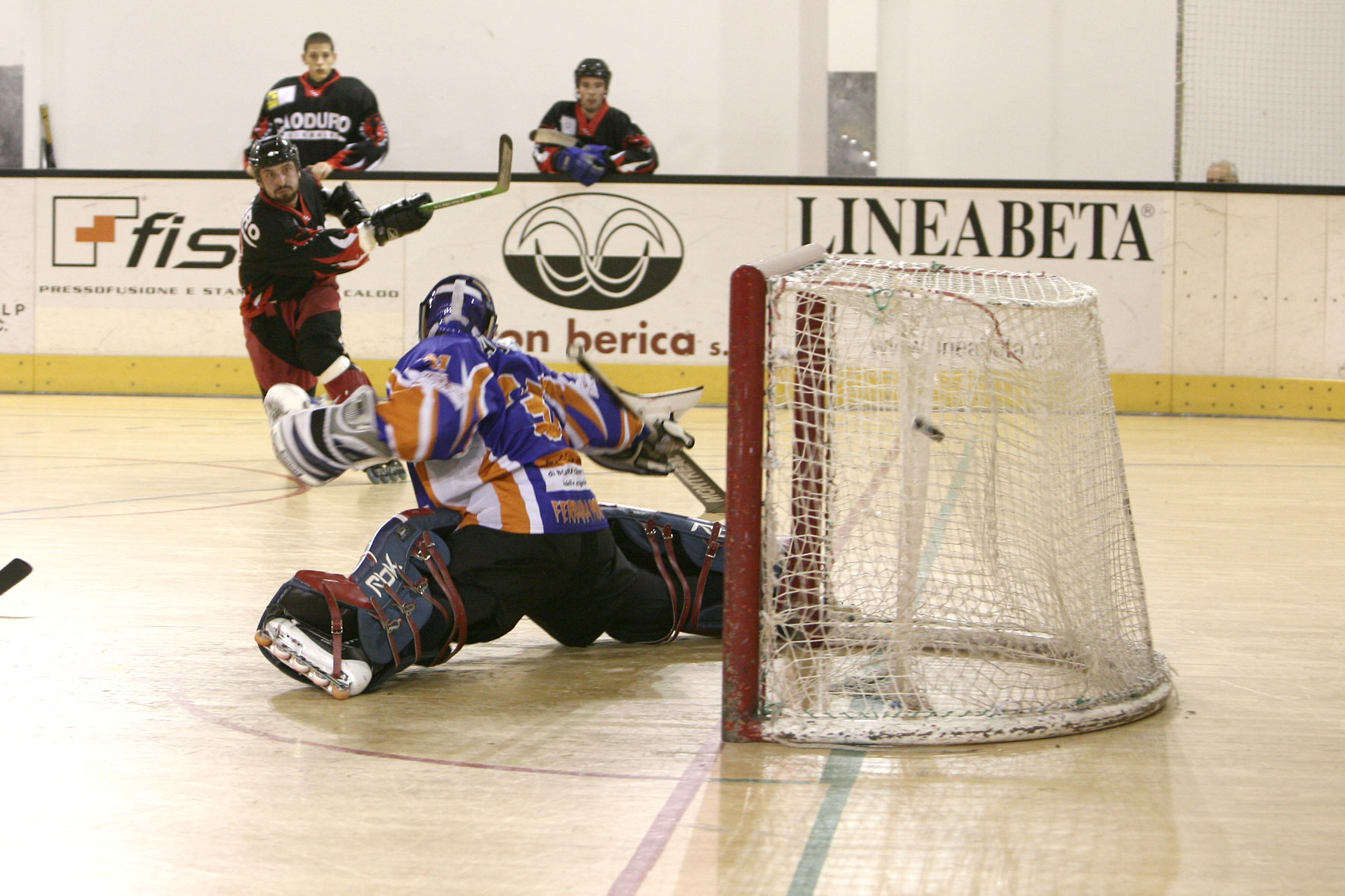 Gol di Luca Roffo segnato contro il Ferrara Hockey nella stagione 2009-10